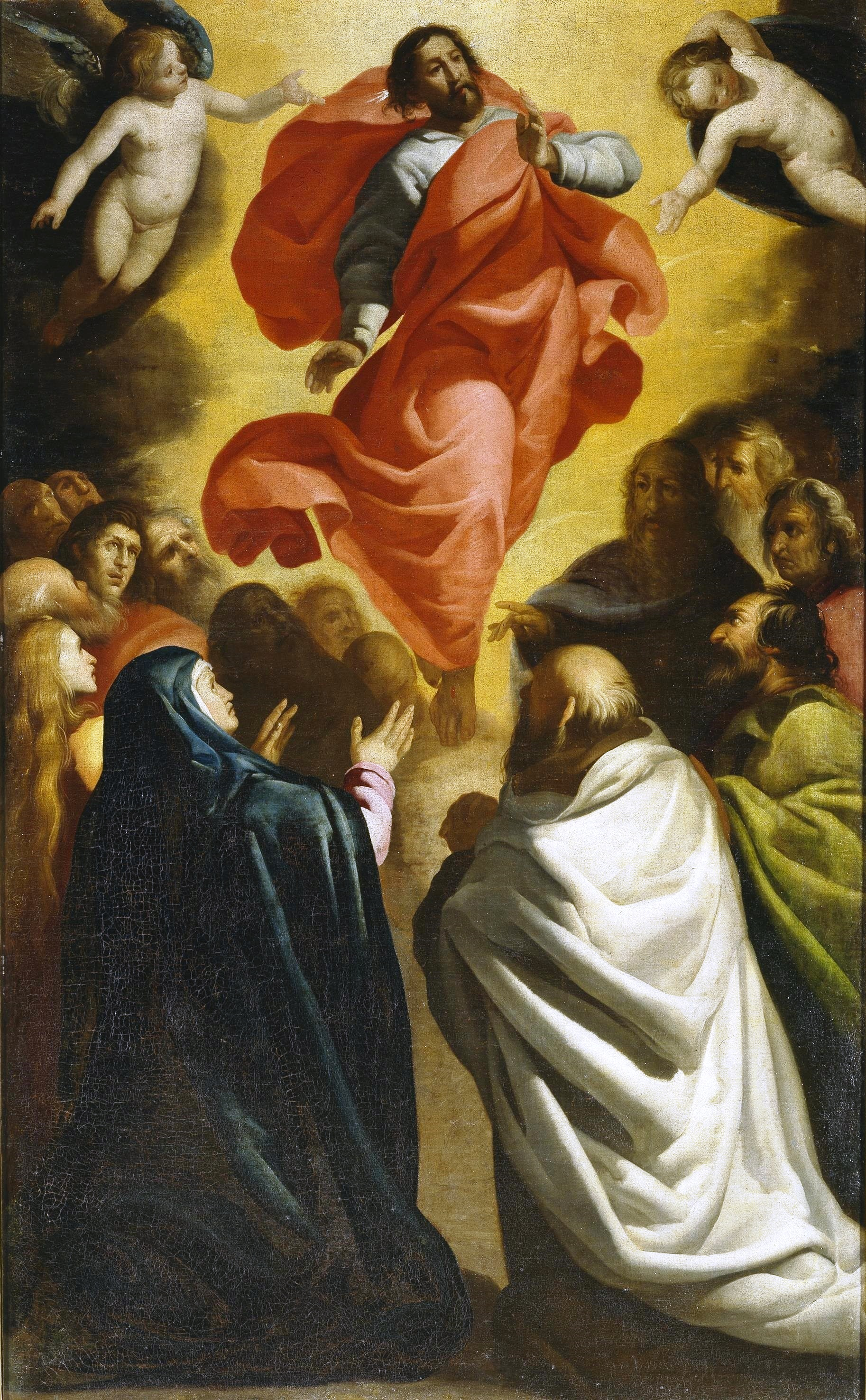 La obra representa la ascensión de Jesucristo a los cielos después de su resurrección, y es una de las dos obras de Antonio de Lanchares que se conservan en el madrileño Museo del Prado.